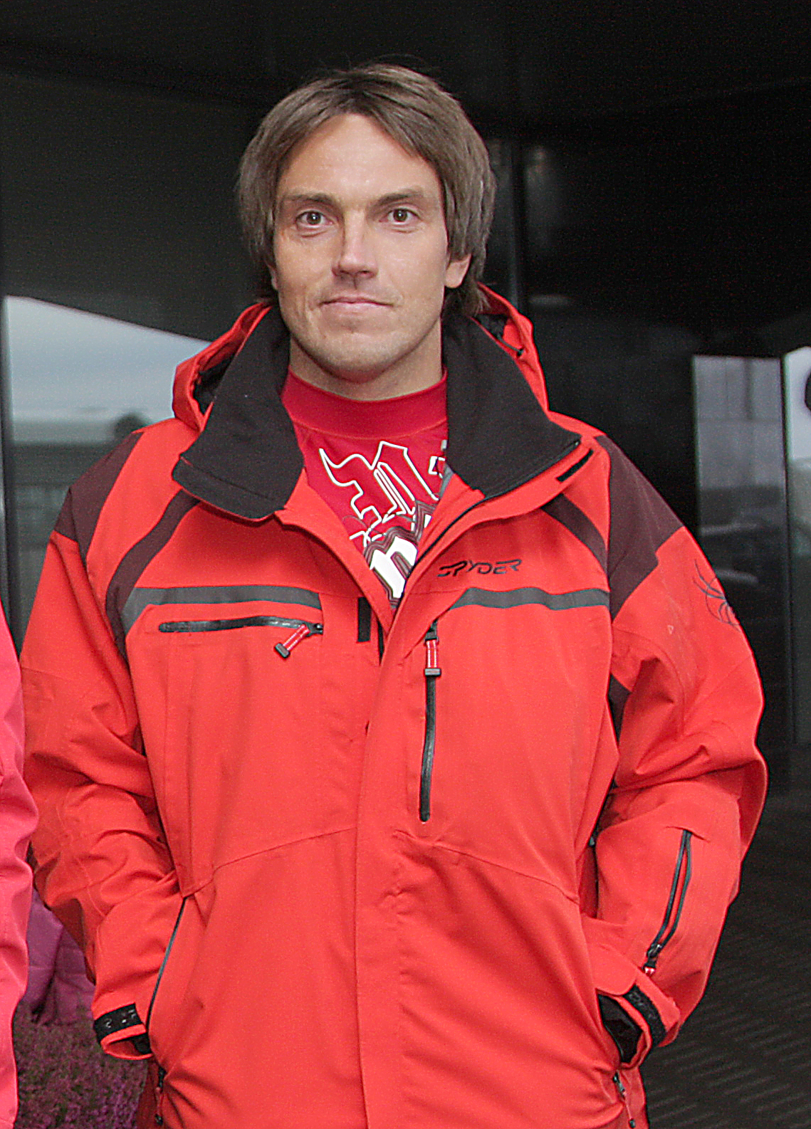 Andras Kaasik